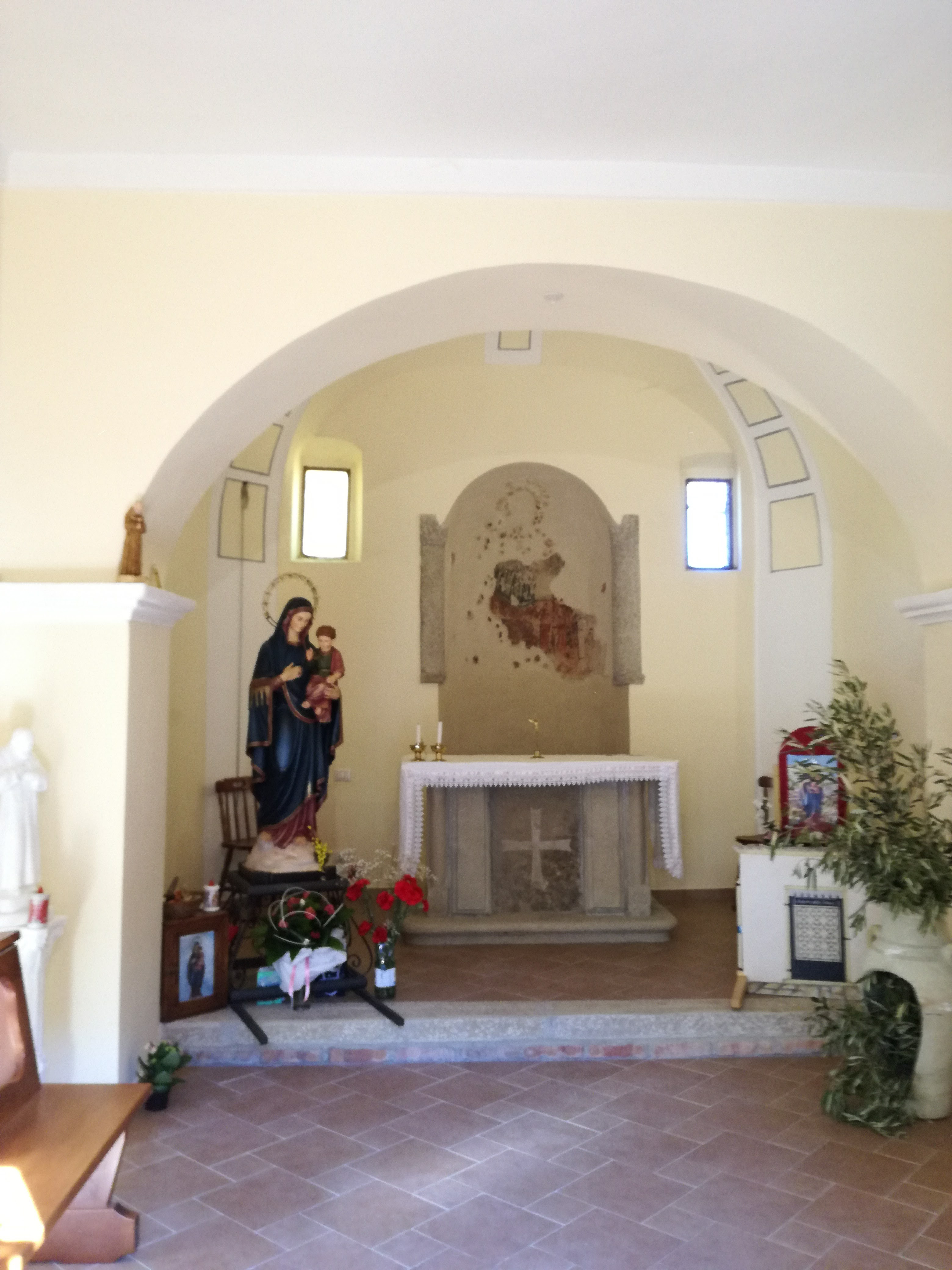 Castelmezzano